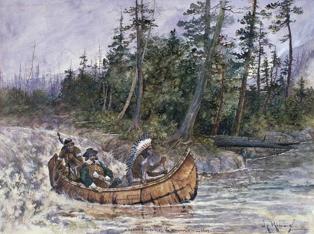 Représentation de Champlain dans un canot avec deux Indiens, descendant des rapides. Aquarelle sur crayon. 57,0 x 41,0 cm.